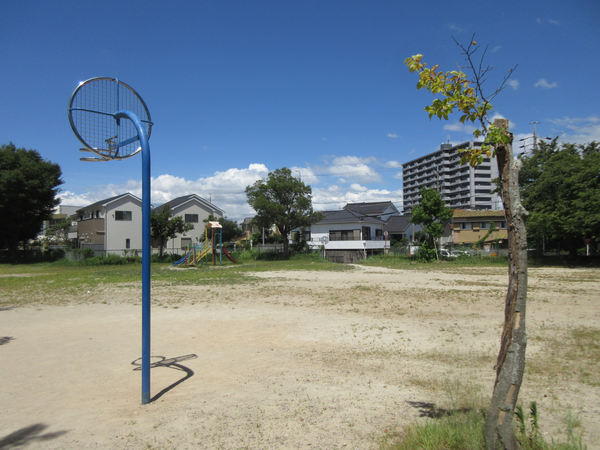 栄町公園（岡崎市栄町）